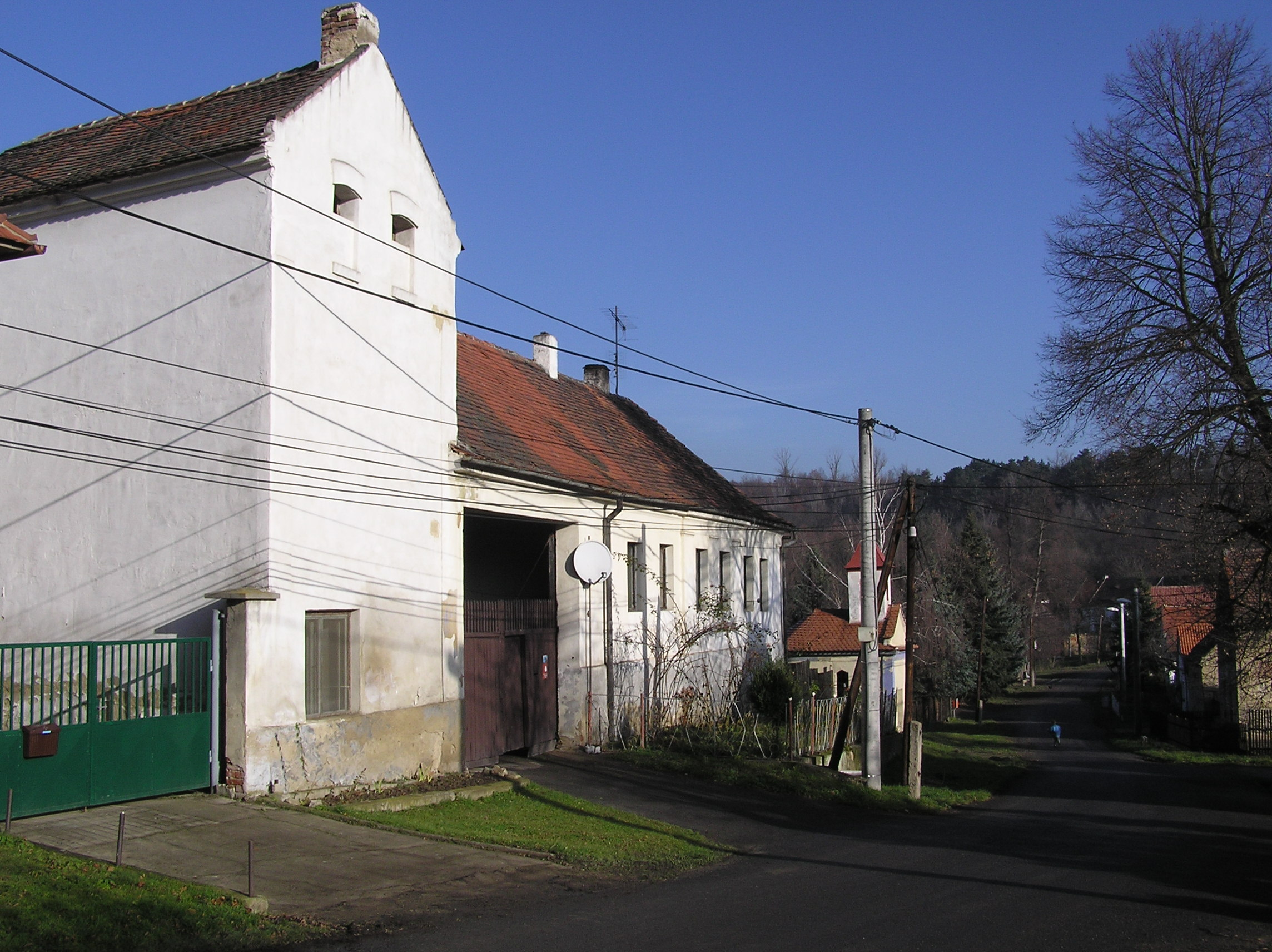 Ulice v Truzenicích